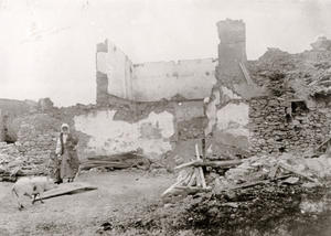 Руините на къщата на Трайко Стерьов и Велика Трайкова в Градобор, запалена от чета на ВМОРО